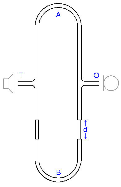 Schematische Darstellung des Quinckeschen Interferenzrohres